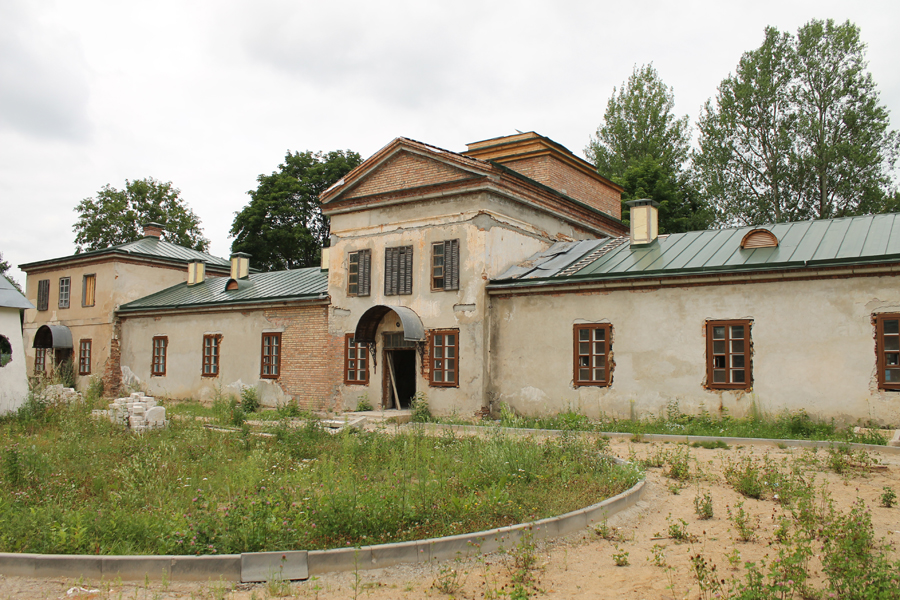 Сядзіба Агінскіх у Залессі